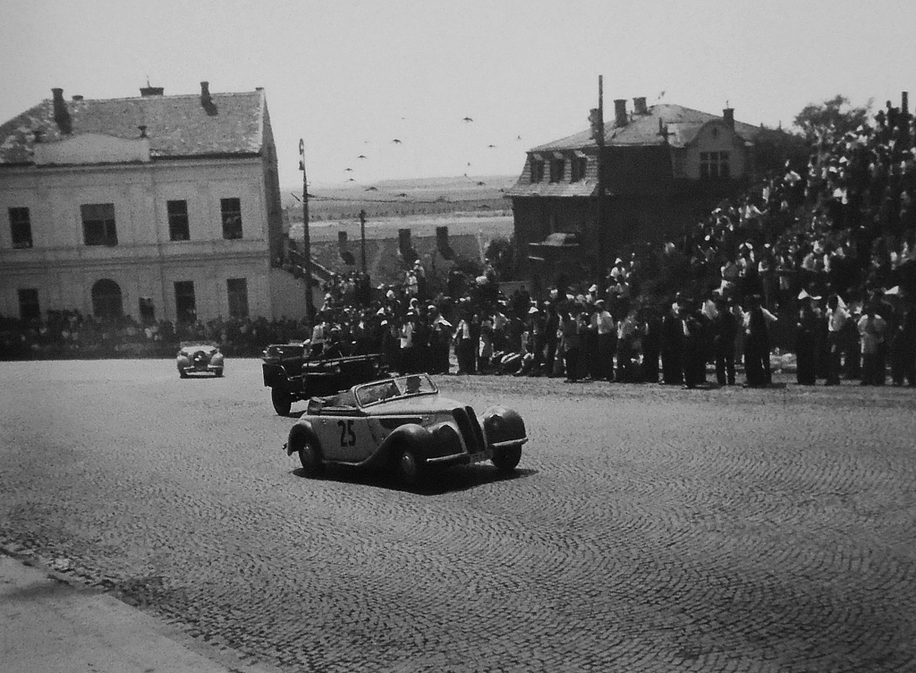 Preteča formule 1 na Kalemegdanu - Međunarodne automobilske i motociklističke trke održane 3. septembra 1939.